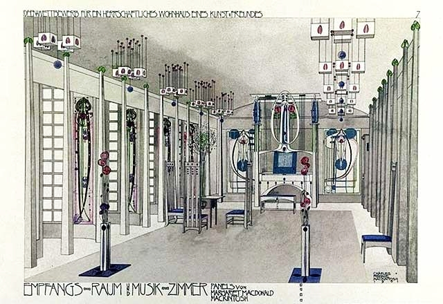 Charles Rennie Mackintosh: Ideen-Wettbewerb für ein herrschaftliches Wohnhaus eines Kunstfreundes. Empfangsraum und Musikzimmer. Panels von Margaret MacDonald Macintosh (Design for a Music Room)